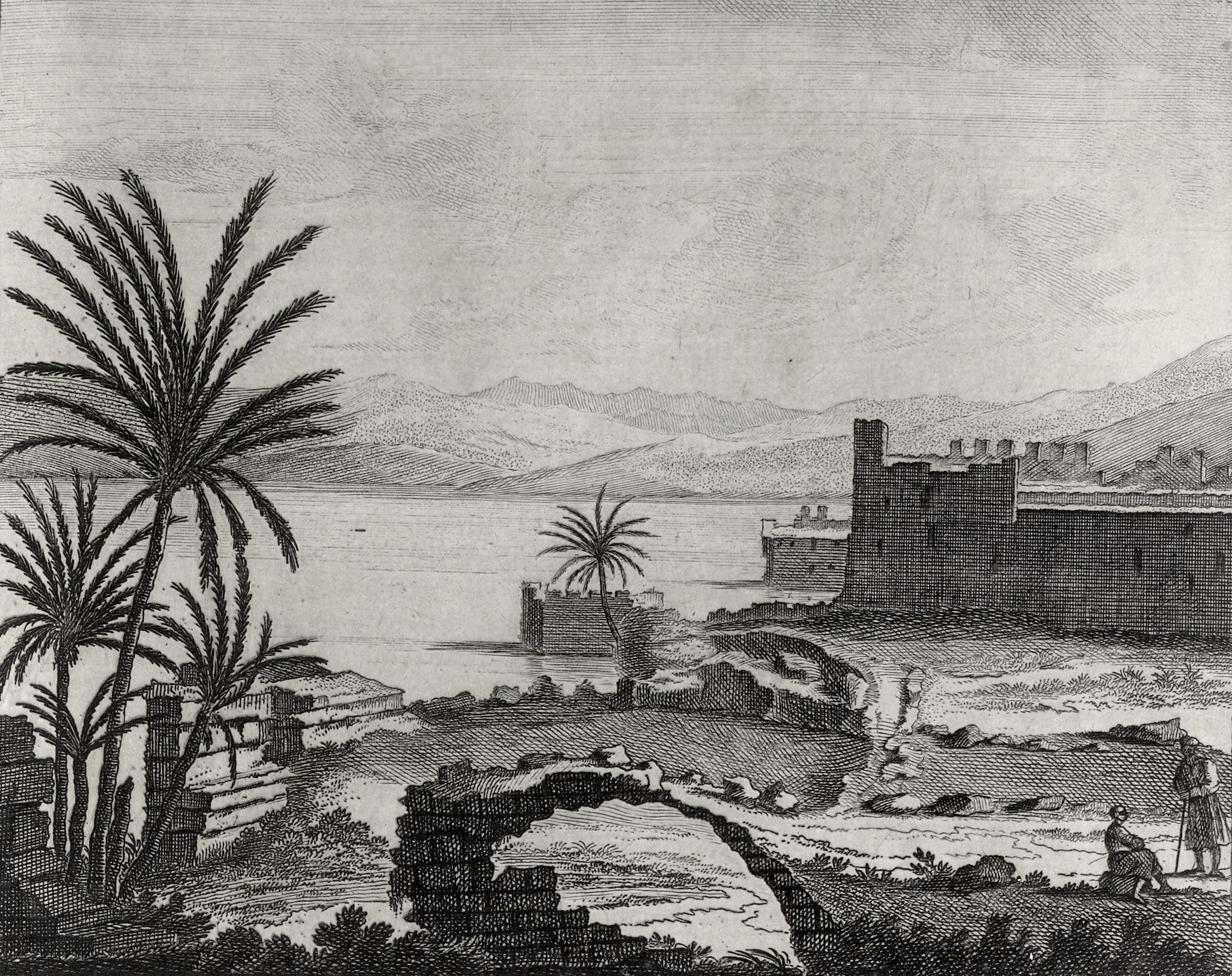 Voyage au Levant, c'est-à-dire dans les principaux endroits de l'Asie Mineure, dans les isles de Chio, de Rhodes, de Chypre, etc., de même que dans les plus considérables villes d'Égypte, de Syrie et de la Terre Sainte... par Corneille Le Brun. Traduit du flamand